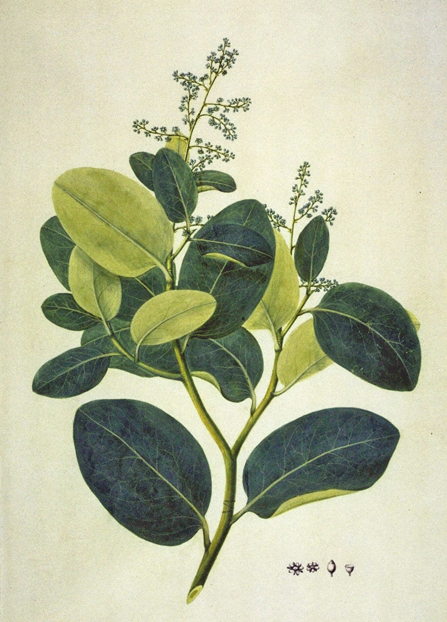 Griselinia lucida, 'Broadleaf'. Griseliniaceae, New Zealand. Māori names: Pāpāuma, Akapuka, Akakōpuka.